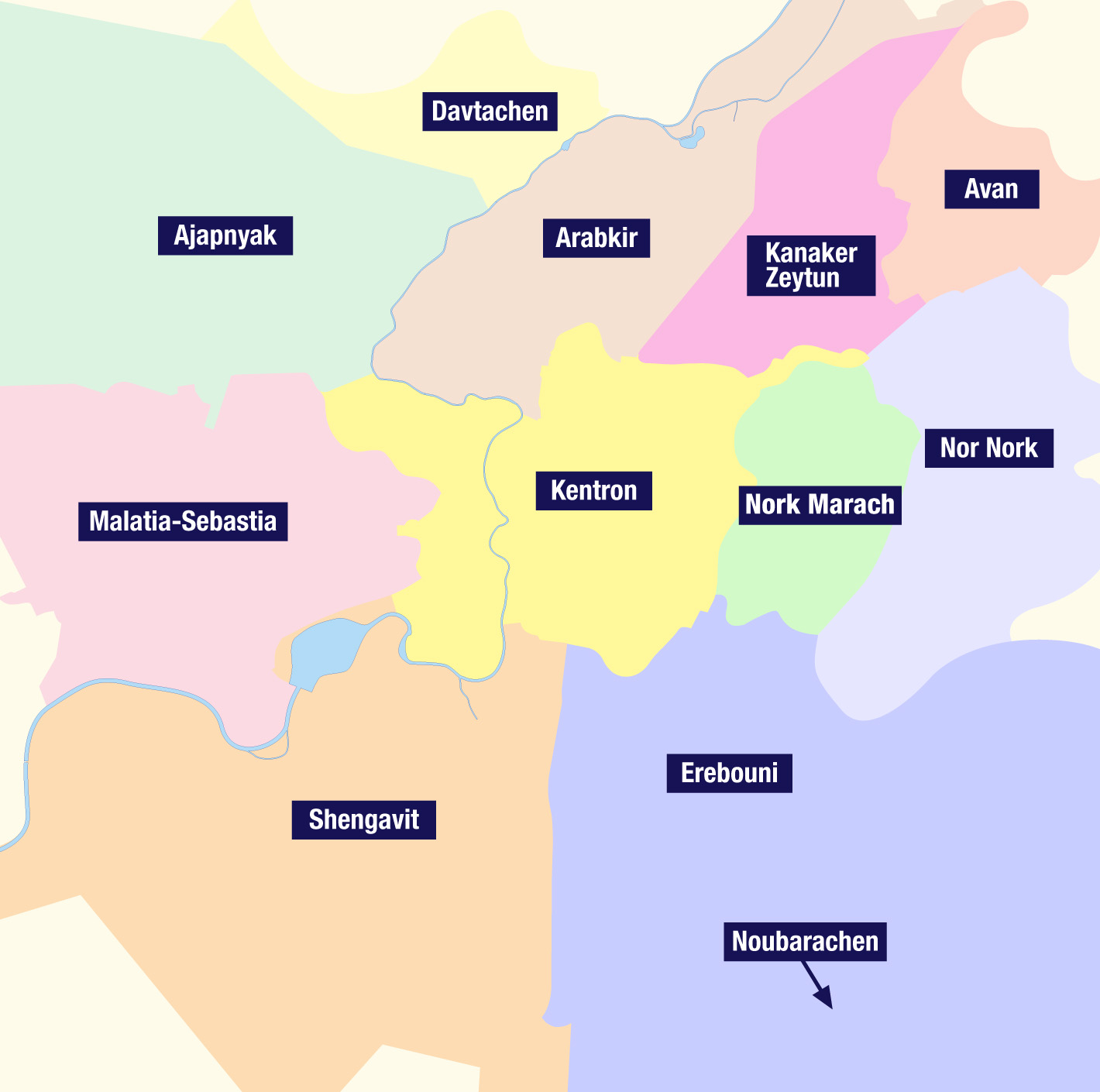 Plan des 12 districts de Erevan